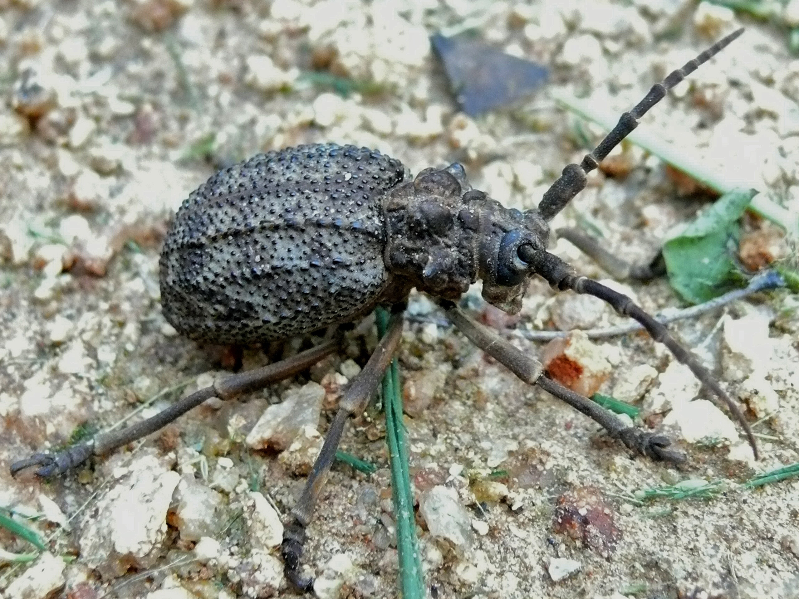 Skukuza Camp, Kruger NP, SOUTH AFRICA